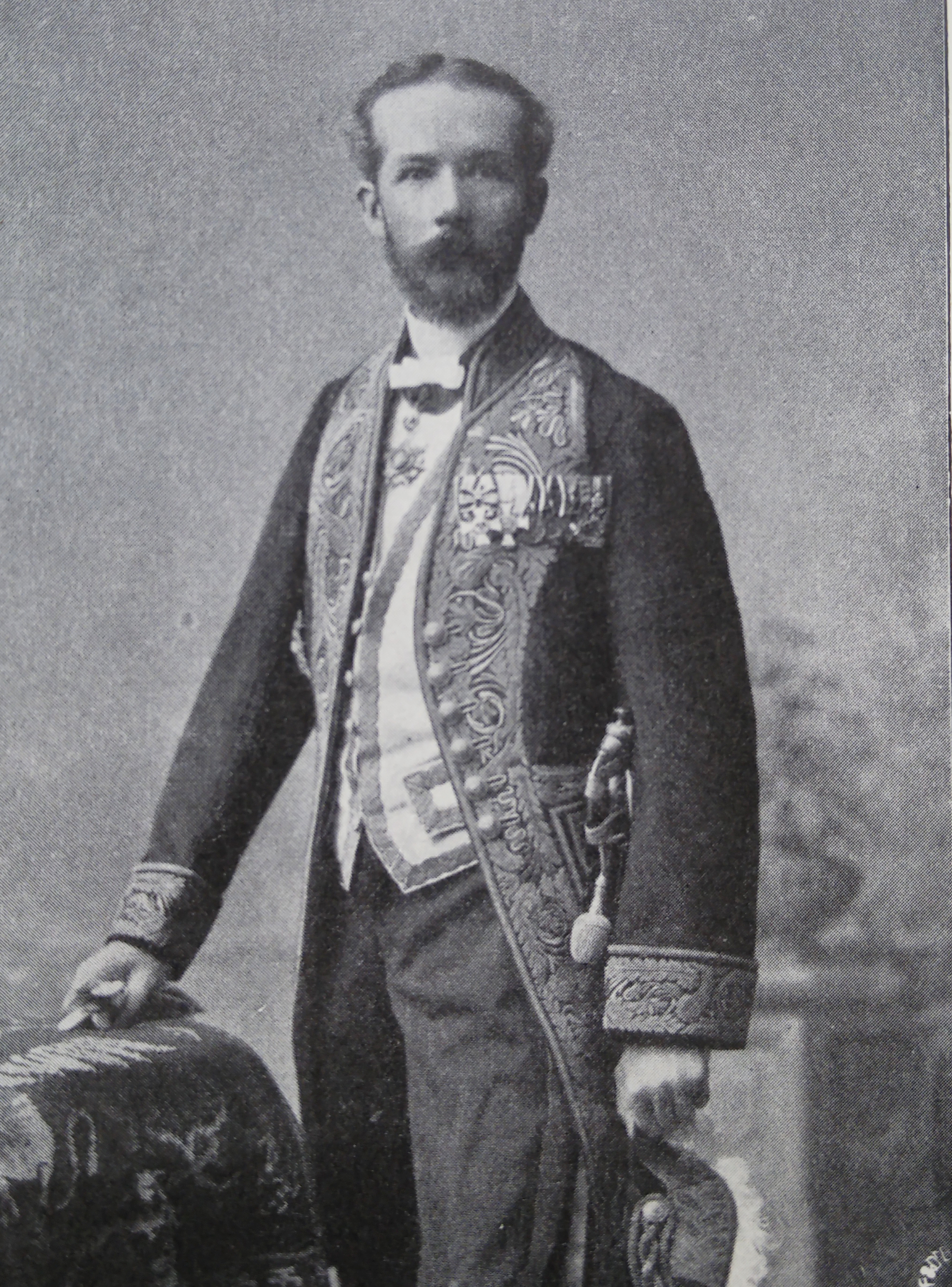 Ernst von Treskow (1844-1915) in Diplomatenuniform (Archiv Familienverband von Treskow)